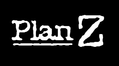 Plan Z fue un programa de televisión humorístico chileno, emitido entre 1996 y 1998 en el desaparecido canal Rock & Pop.